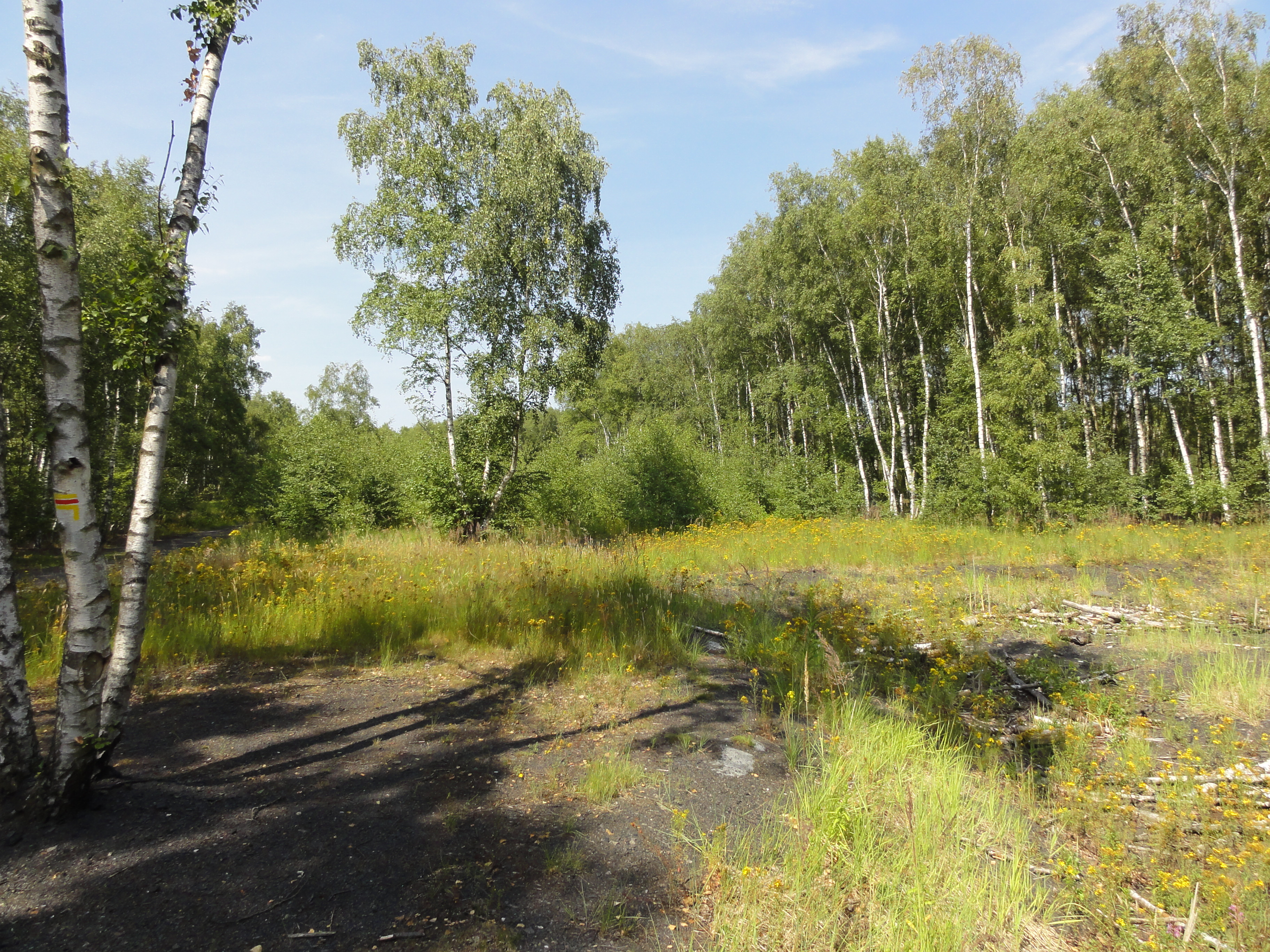 Terril n° 139 dit Paturelles, Fosse n° 1 de la Compagnie des mines de l'Escarpelle, Roost-Warendin, Nord, Nord-Pas-de-Calais, France.